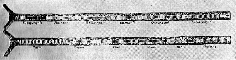 Болгарский календарь из окрестностей г. Хасково